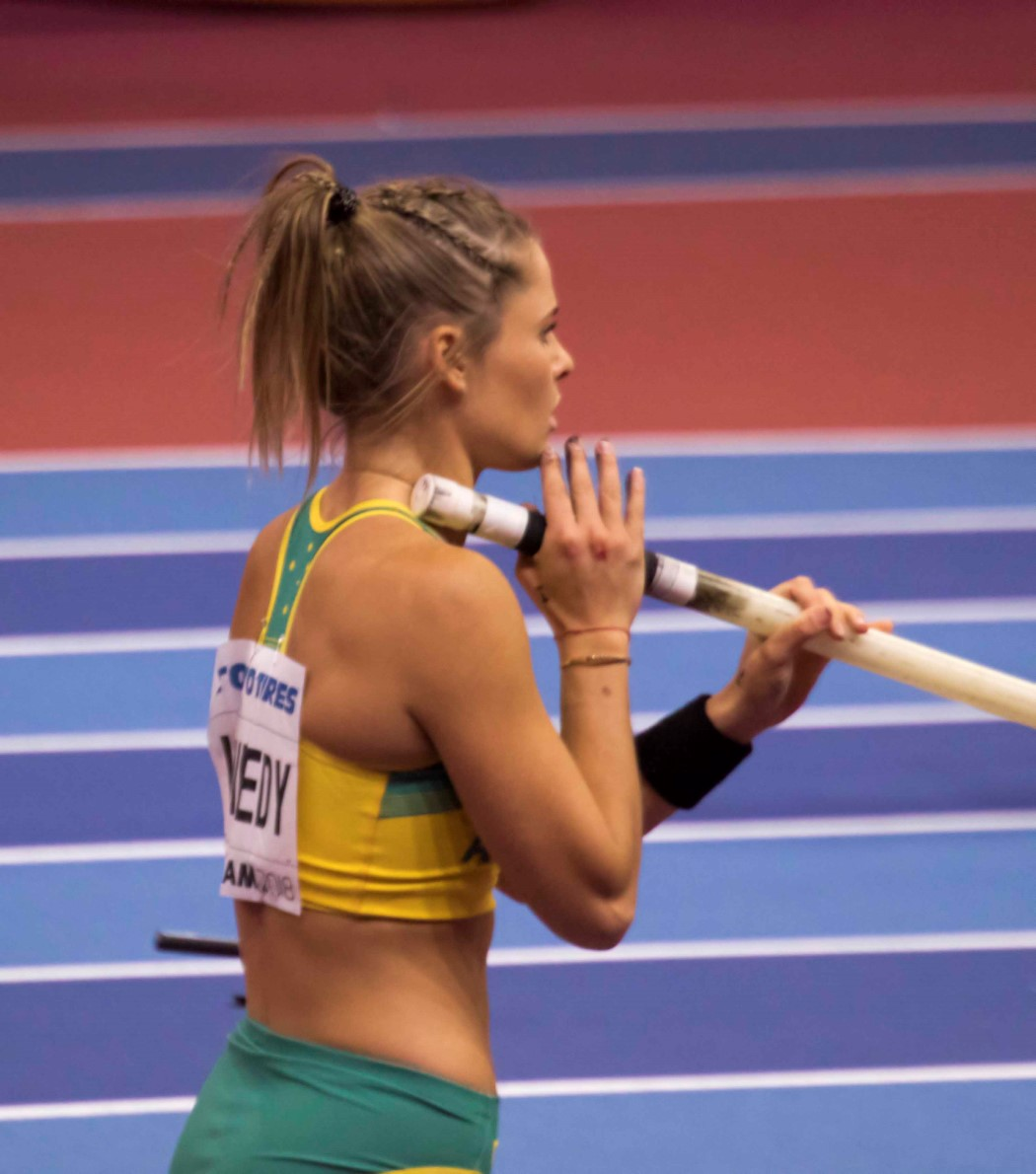 WK3B0103 pôlsstok dames kennedy